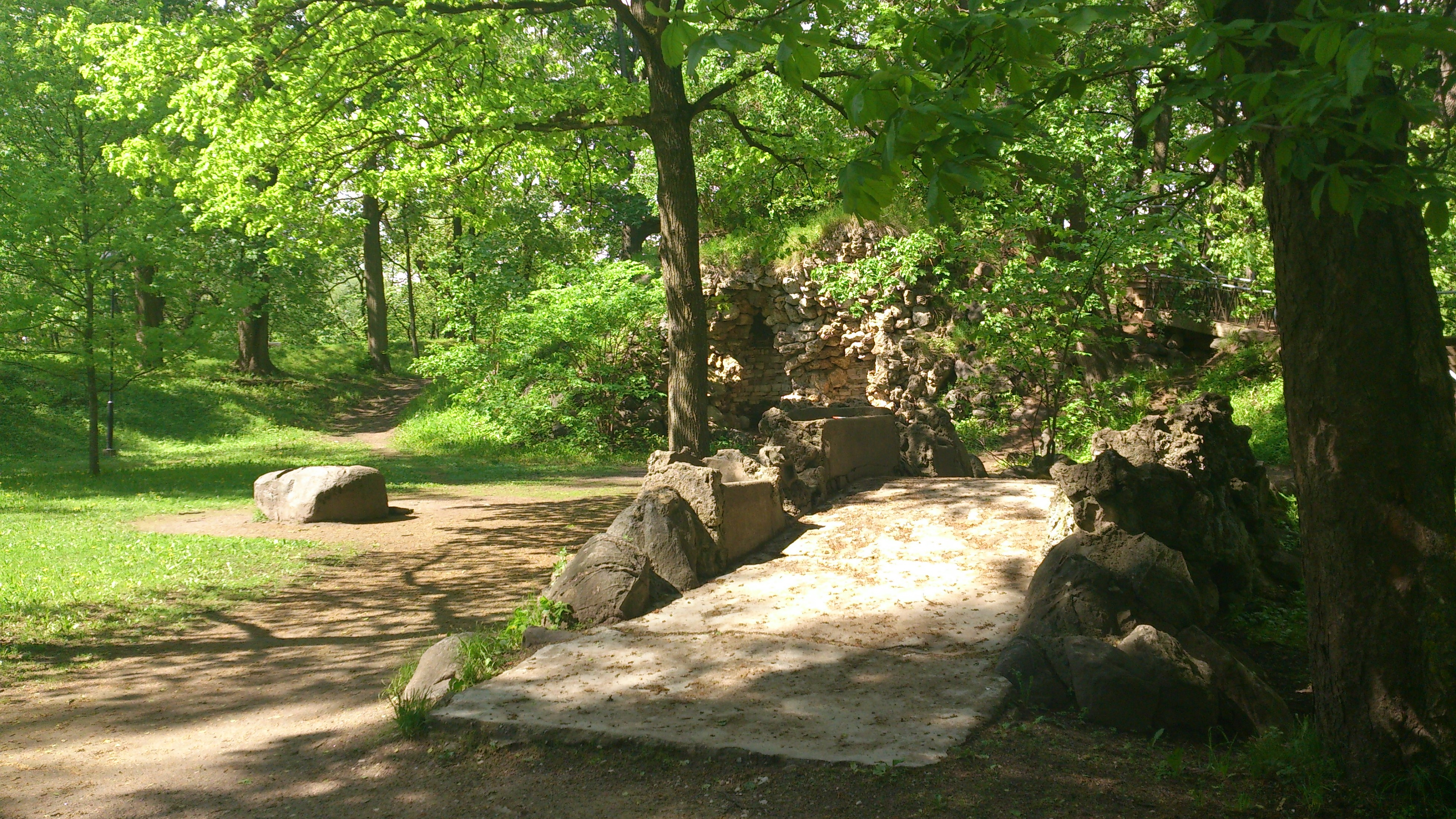 Toomemäe ohvrikivi, Musumägi ja ehissild, 24. mai 2014